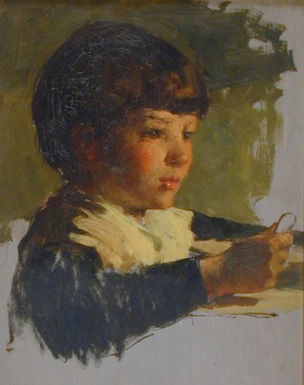 Etude de portrait du fils de l'artiste pour le tableau "L'Infusion" présenté au Salon de Paris en 1912 (sous le N° 1582). Le fils Jean a souvent servi de modèle dans les scènes intimistes familiales aux cotés de sa maman Marion.